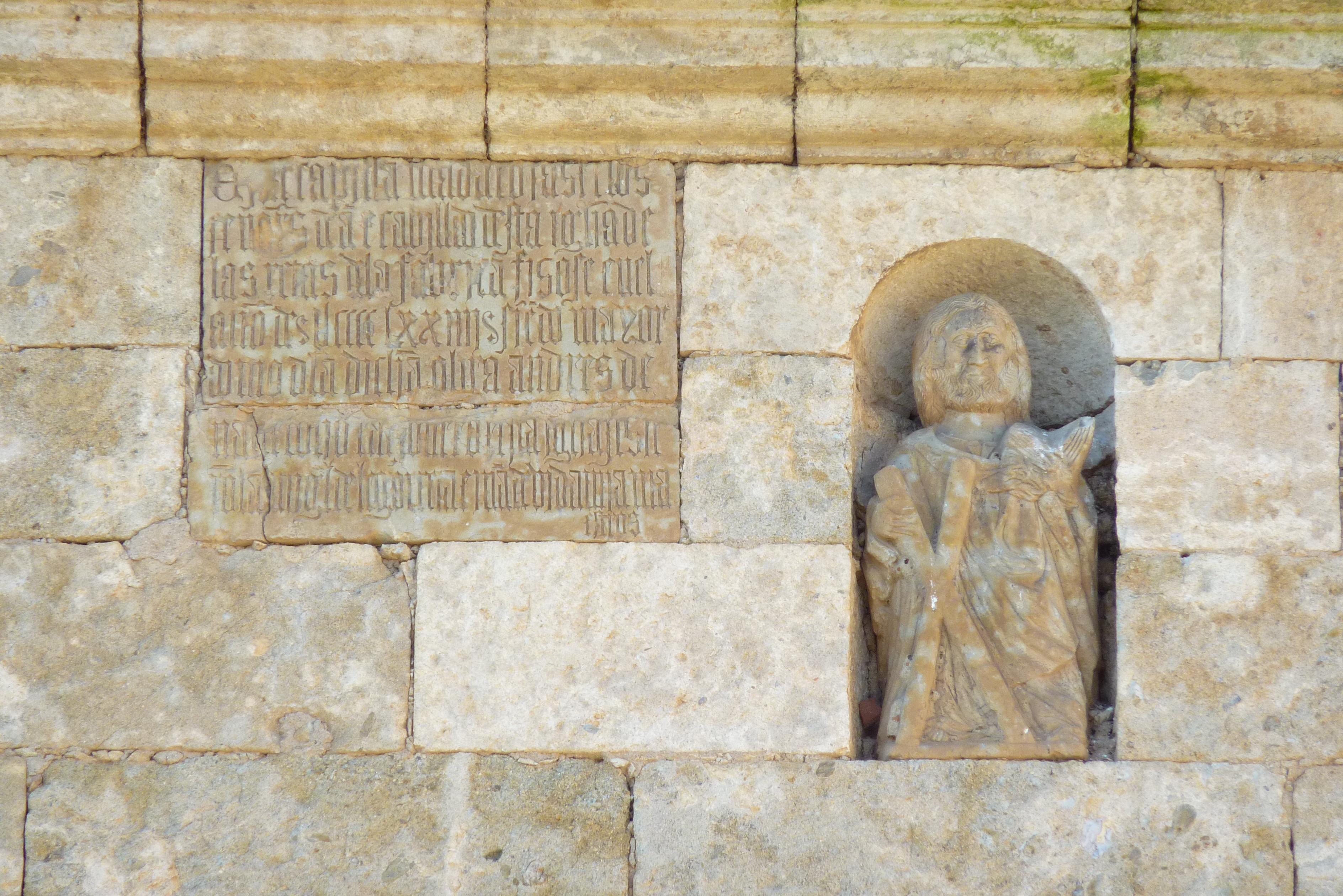 Kathedrale Santa María in Ciudad Rodrigo in der Provinz Salamanca (Kastilien-León/Spanien), Skulptur des Apostels Andreas am nördlichen Querhaus